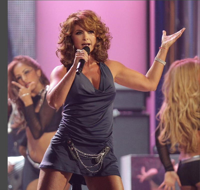 Lucero Hogaza León